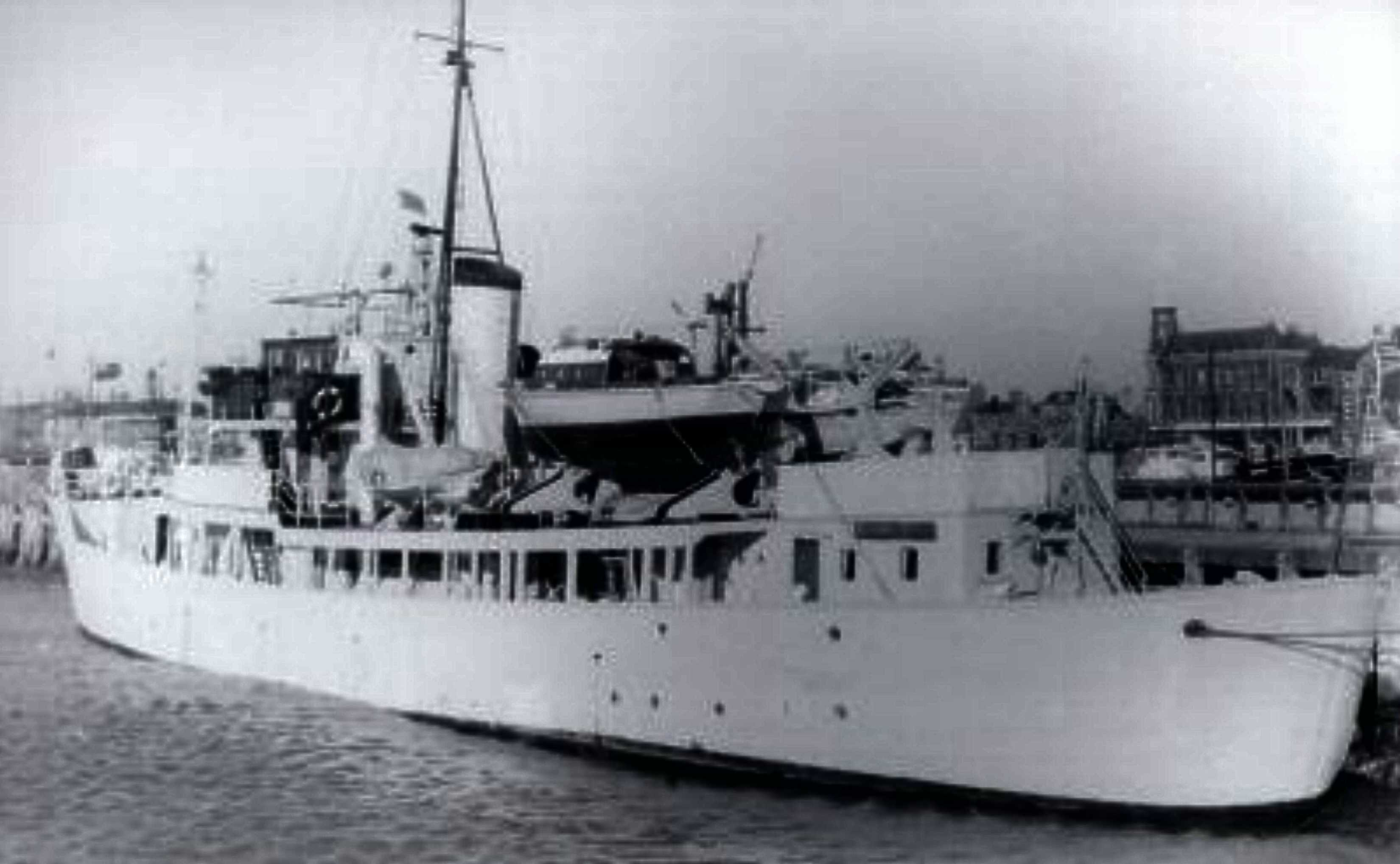 HMRC Vigilant (1947)